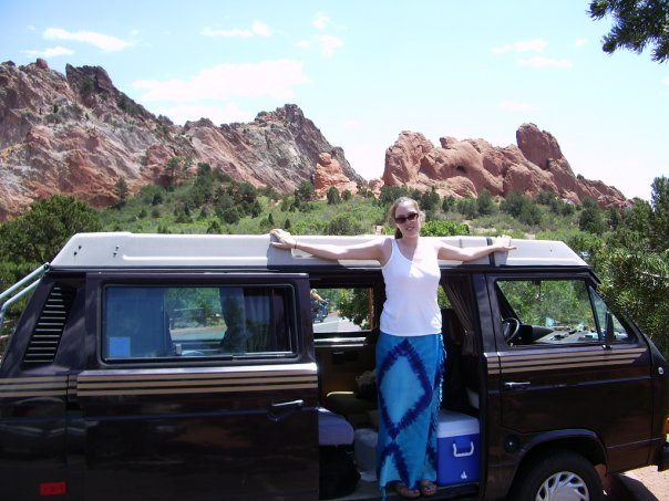 A hippie standing on a hippie van in hippie-land.